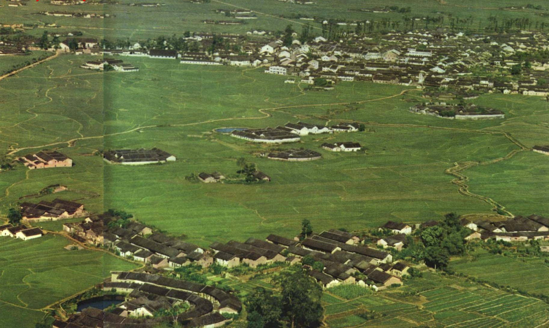 1963-09 1963年 蕉岭